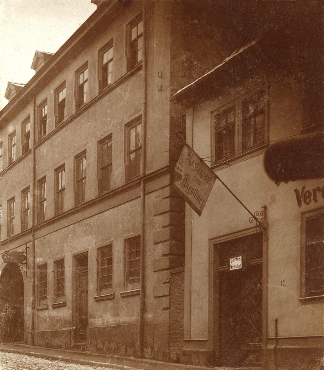 Gotha, Augustinerstraße 15 (Amtshaus) und 17, um 1900